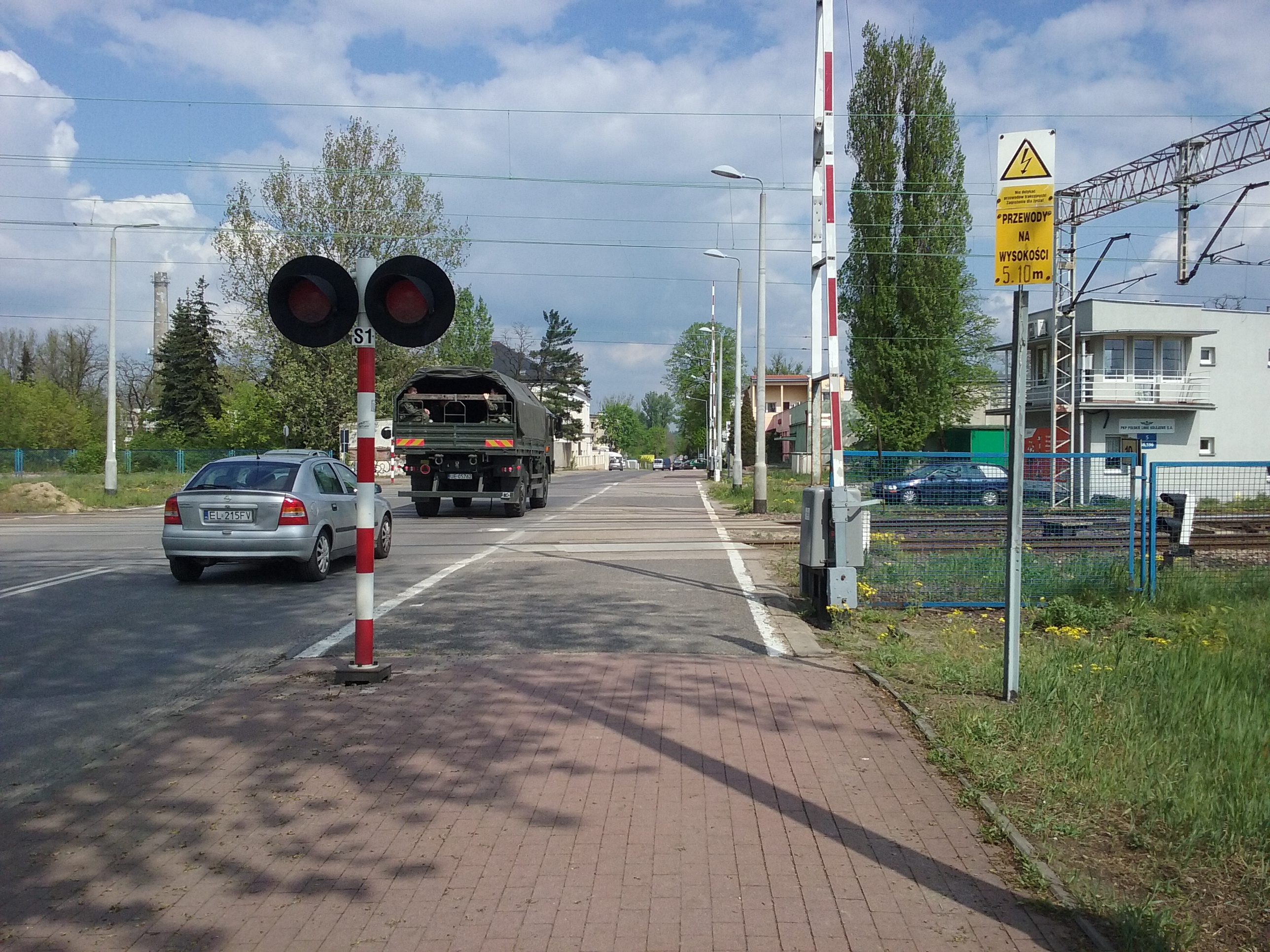 Tomaszów Mazowiecki w województwie łódzkim, PL, EU. Rogatka przy ulicy Spalskiej, CC0